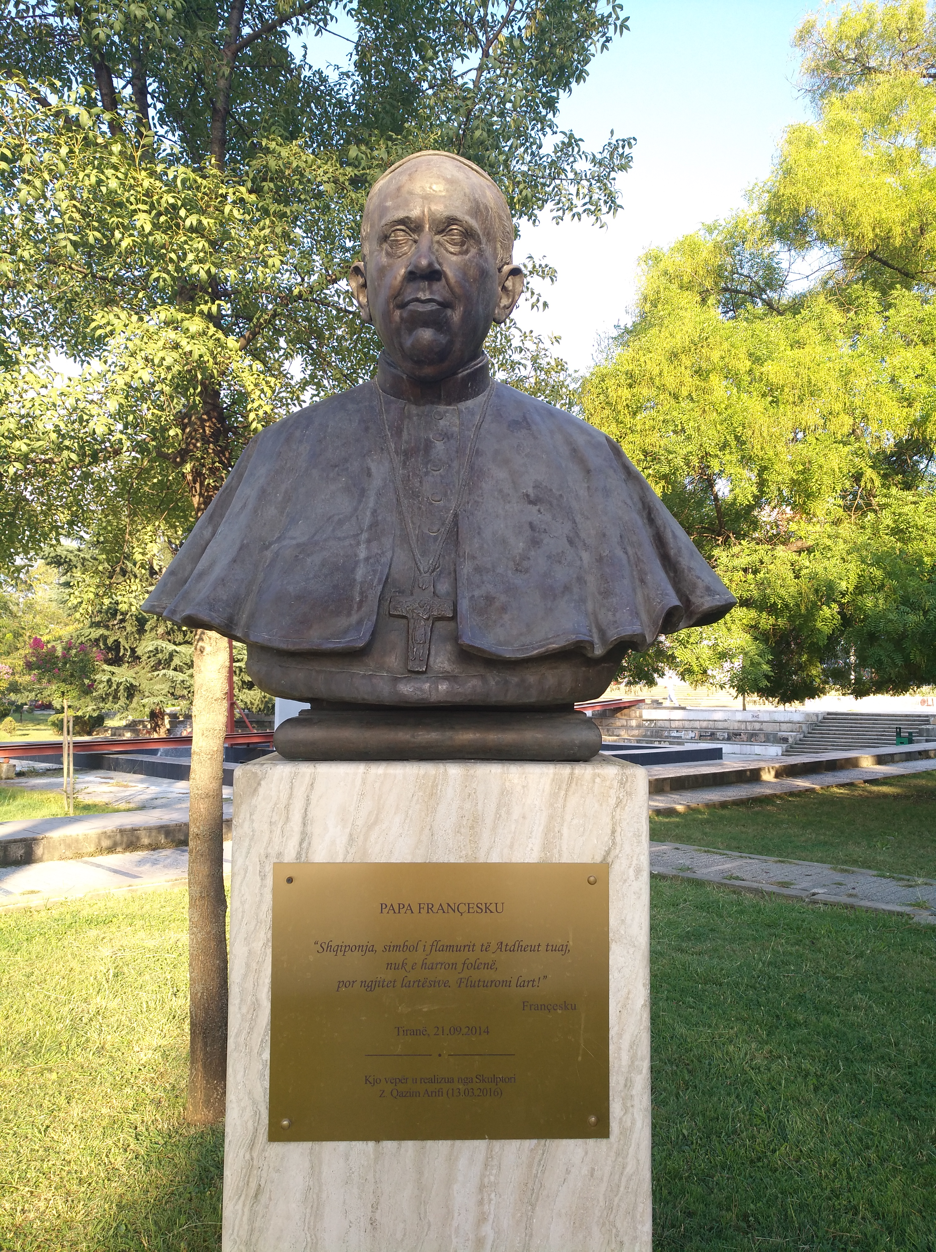 Buste du pape François, boulevard Dëshmorët à Tirana (Albanie).